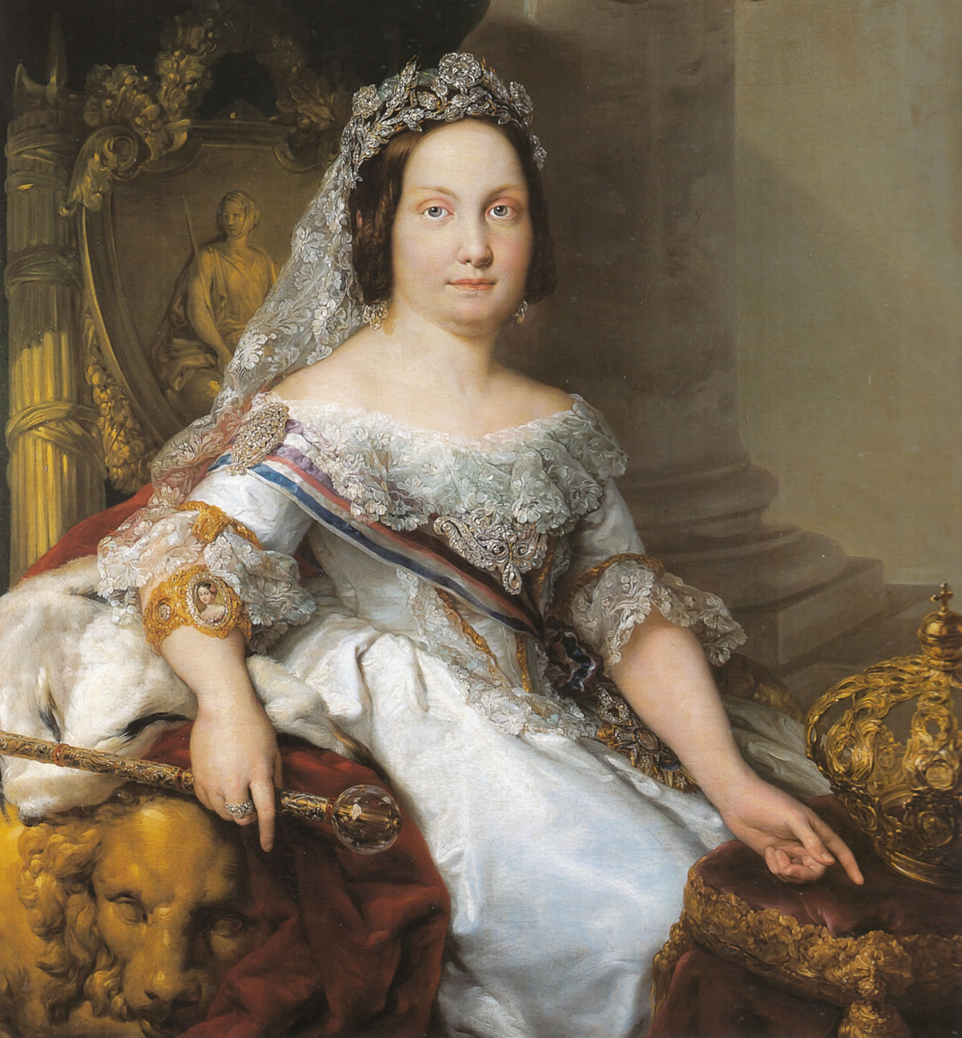 Retrato de la reina Isabel II de España (1830-1904), que fue hija del rey Fernando VII y la madre de Alfonso XII.